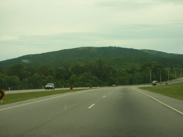 Foto del cerro San Antonio (desde Ruta Interbalnearia cerca Portezuelo)